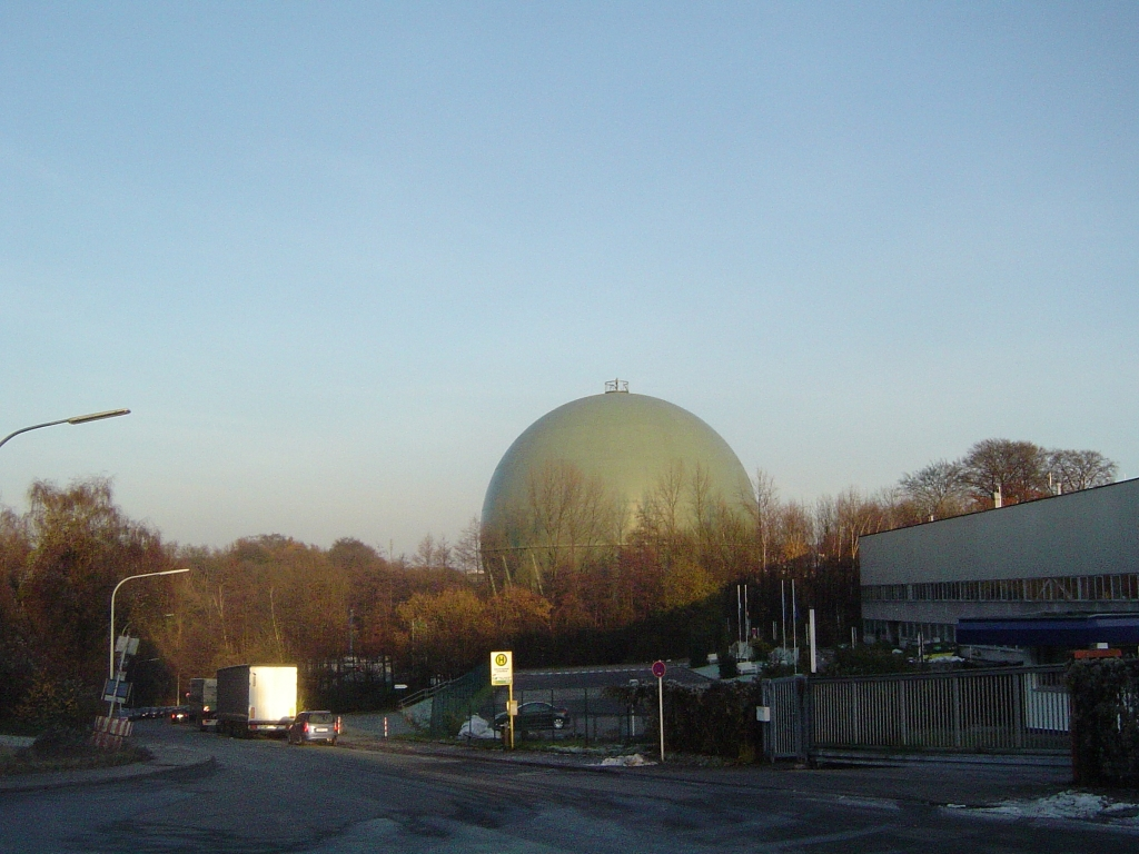 Der Gaskessel an der Lüntenbeck in Wuppertal-Vohwinkel selbst fotografiert von Pitichinaccio, 10-12-2005